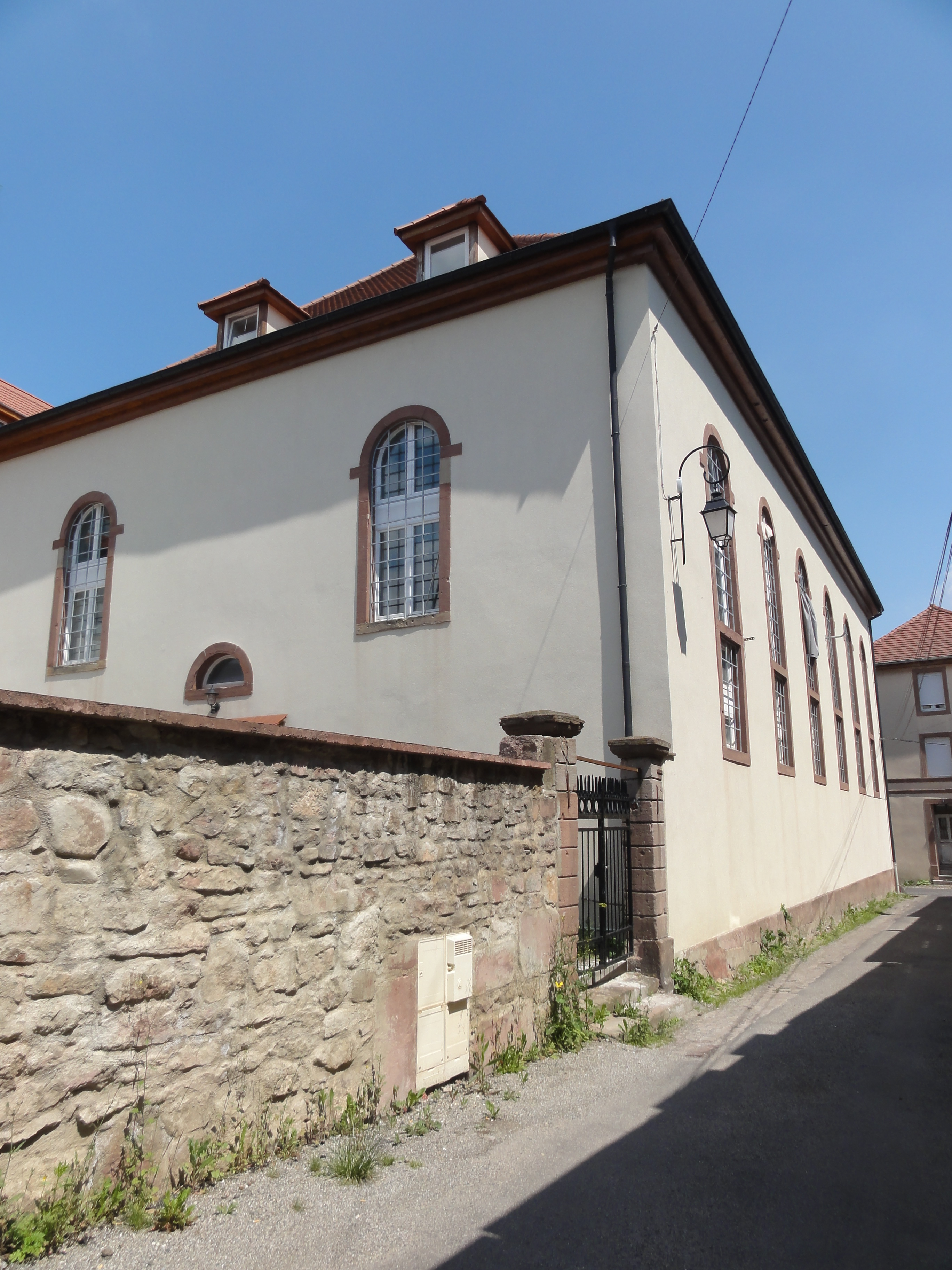 Alsace, Soultz-Haut-Rhin, Synagogue (1835-1838), rue de la Synagogue, rue des Bouchers. It is indexed in the Base Mérimée, a database of architectural heritage maintained by the French Ministry of Culture, under the references PA00085684 and IA00111950.